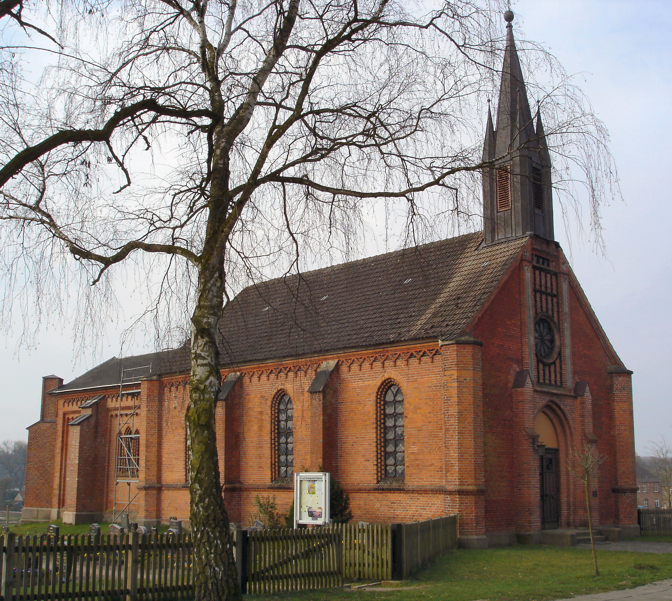 Kirche in Badow / Church in Badow (Mecklenburg-Western Pomerania)